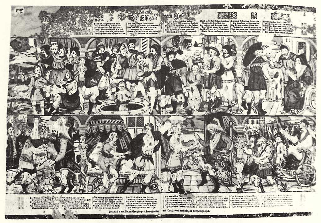 Jürgen Creutzberger: Die Geschichte von Josef aus der Jakobikirche in die Graphiksammlung des St.-Annen-Museums übernommen